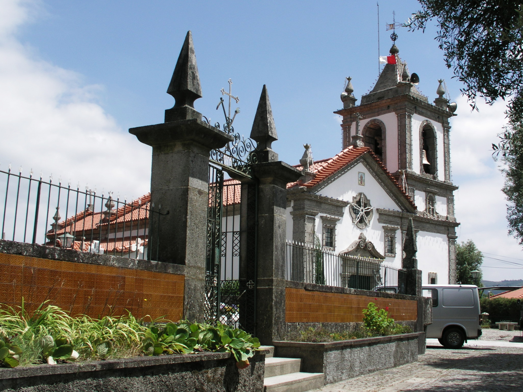 Igreja, Cendufe, Concelho de Arcos de Valdevez, Portugal